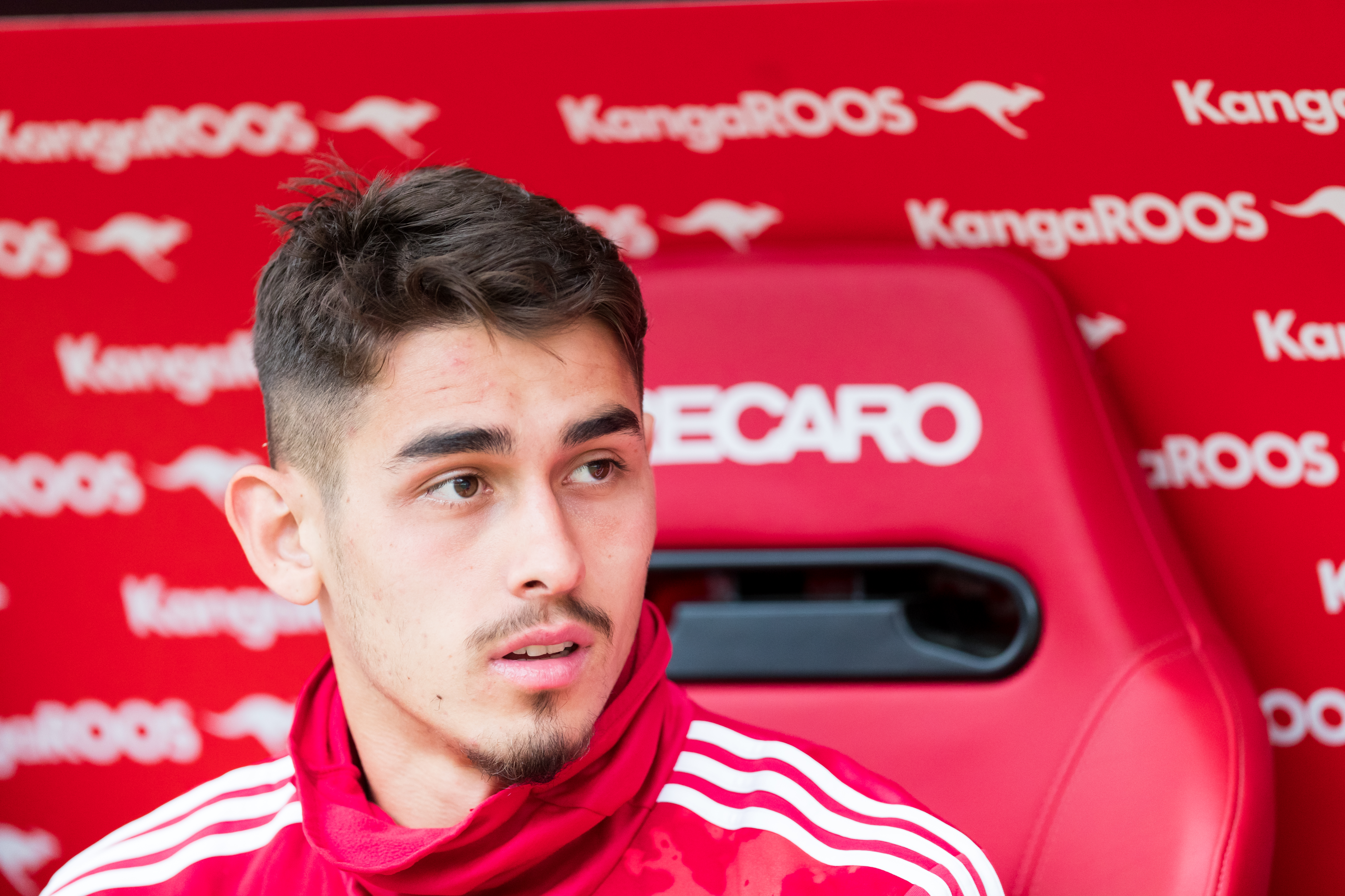 during 1.FC Kaiserslautern vs FC Bayern München at Fritz-Walter-Stadion, Kaiserslautern, Rheinland-Pfalz, Germany on 2019-05-27, Photo: Sven Mandel